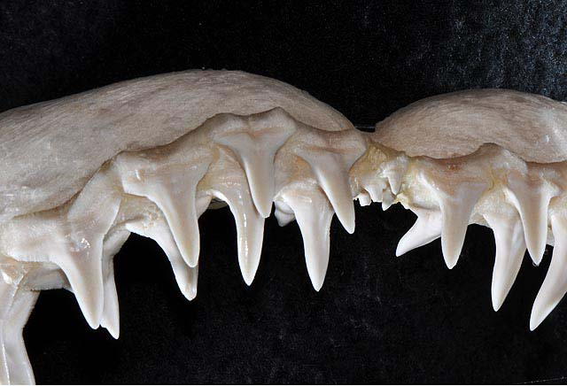 Negaprion brevirostris